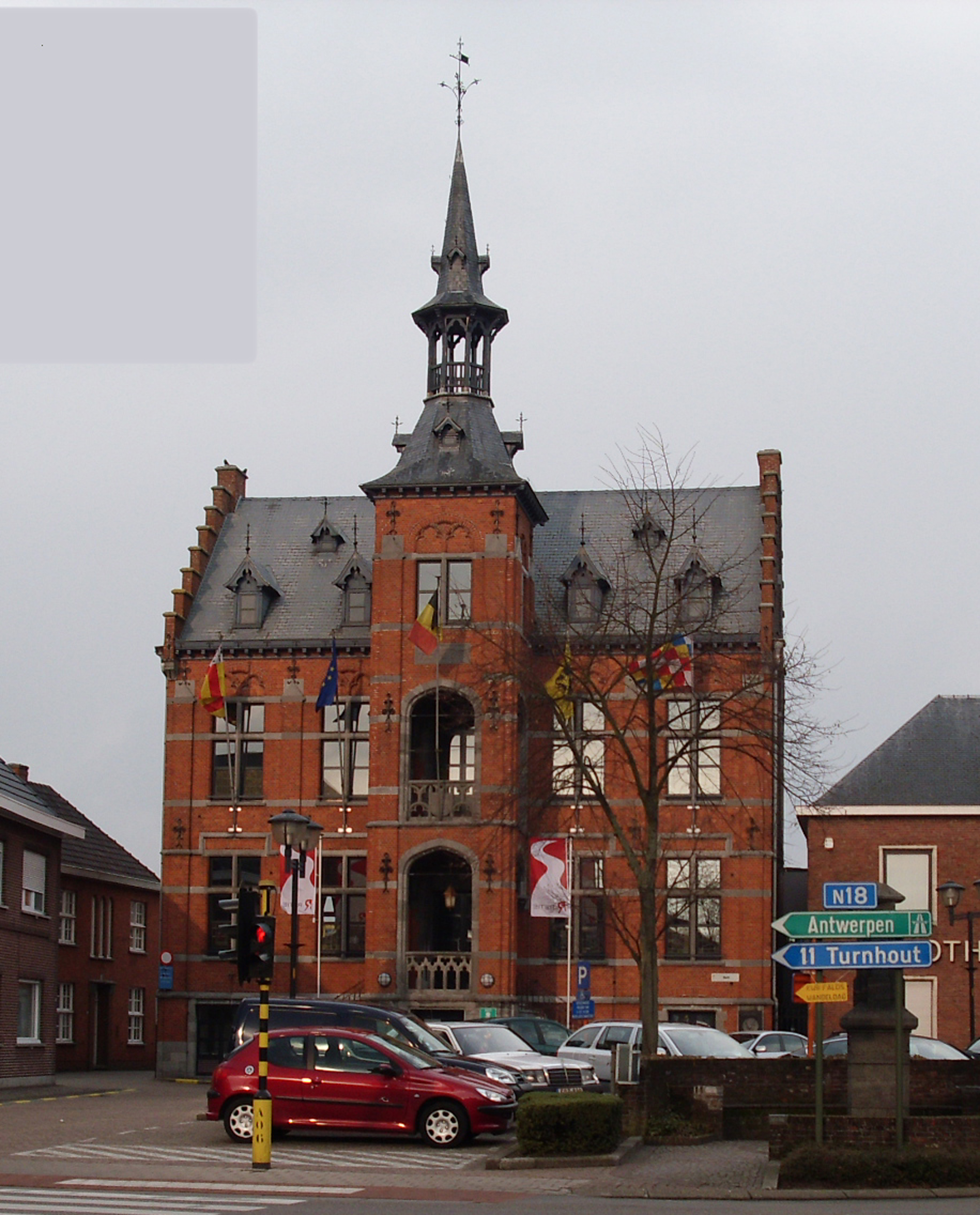 Gemeentehuis van Retie (1898) - Kempen - Prov. Antwerpen - Vlaanderen - België